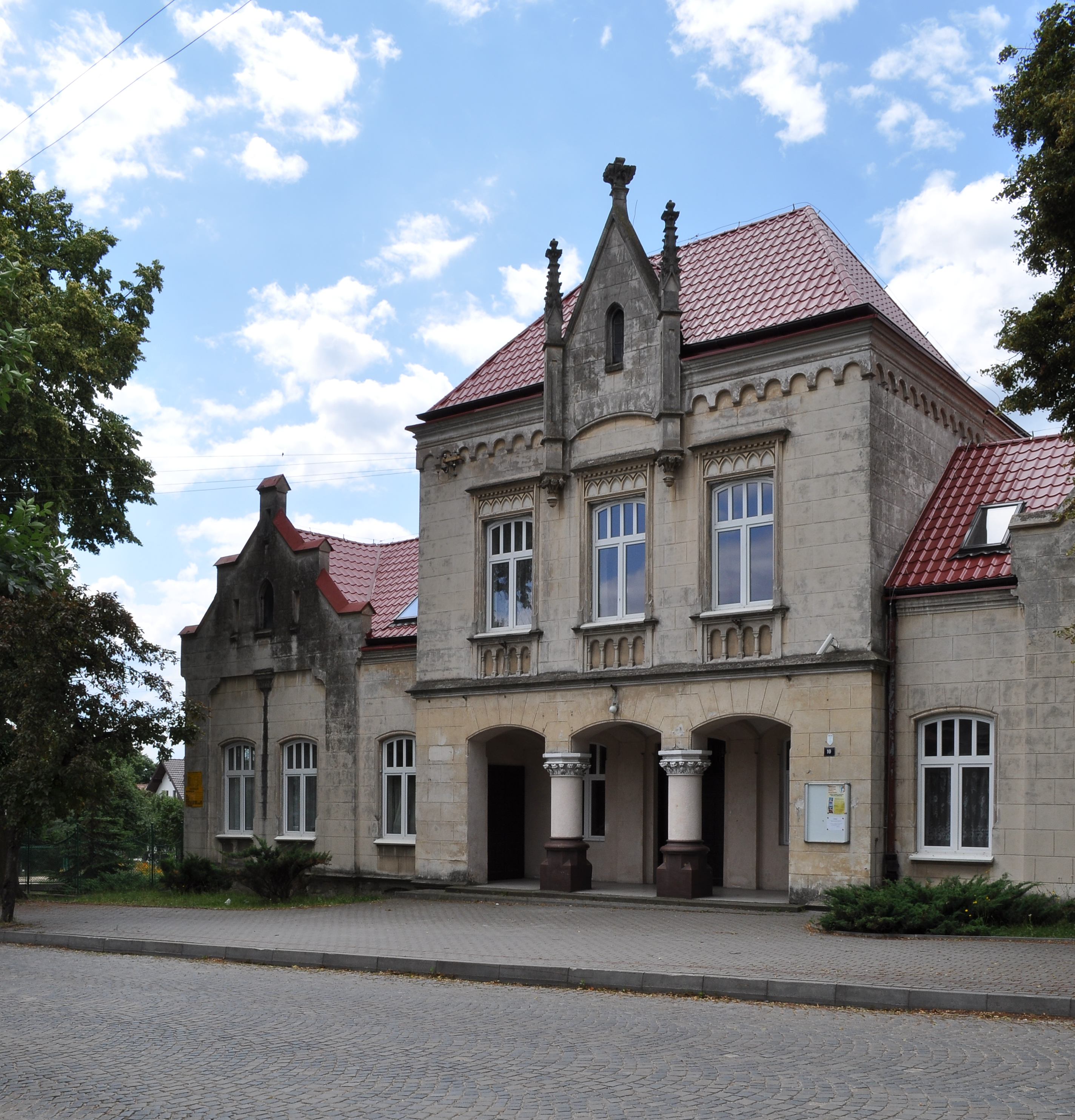 budynek Rady Powiatowej (obecnie Państwowa Szkoła Muzyczna I i II stopnia imienia Mieczysława Karłowicza), Mielec, ul. Kościuszki 10